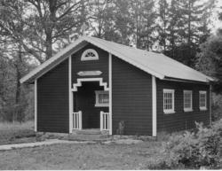 Nårungabygdens Missionshistoriska Museum invigt 1935